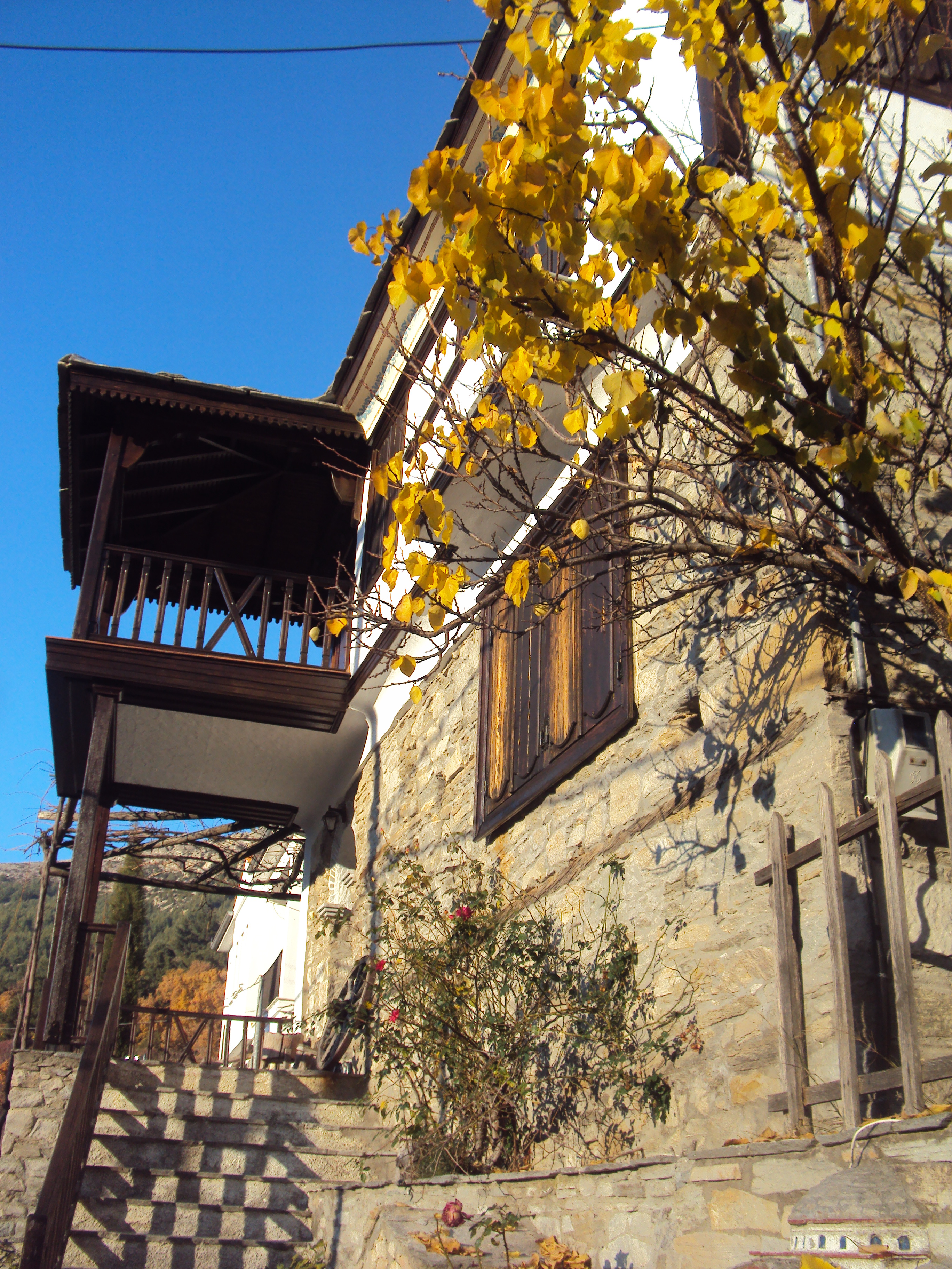 παραδοσιακή αρχιτεκτονική